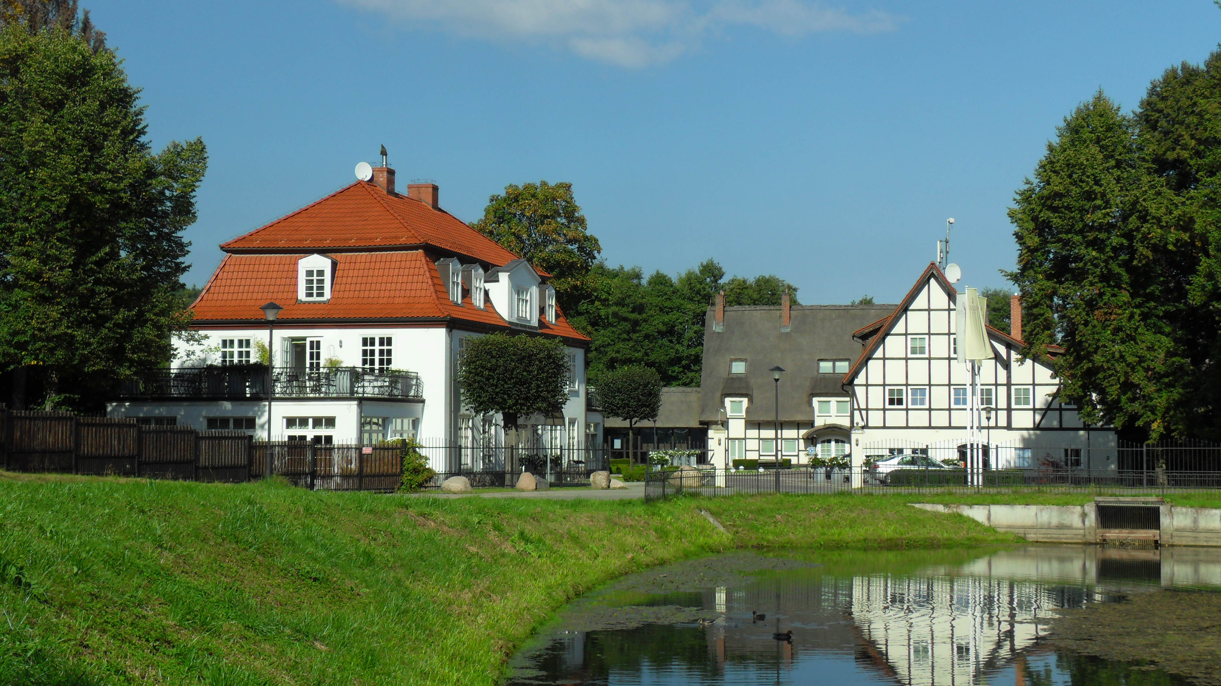 Gdańsk Oliwa, hotel "Dwór Oliwski", ul. Bytowska 4 i staw (Potok Oliwski).